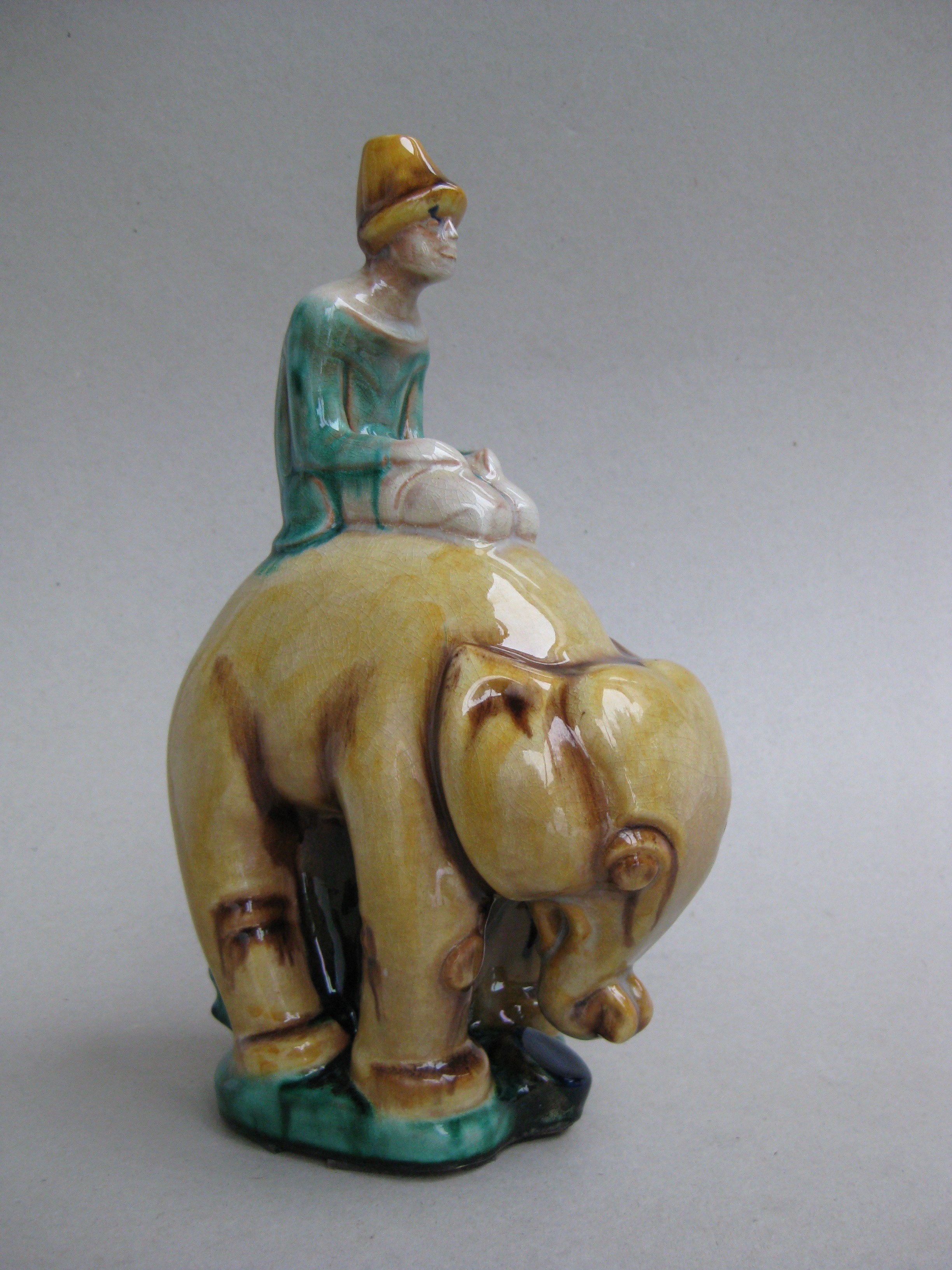 Kieler Kunst-Keramik AG, Elefantenreiter, 1924, Höhe 27,3 cm, Entwurf: Augusta Kaiser, Norddeutsche Privatsammlung